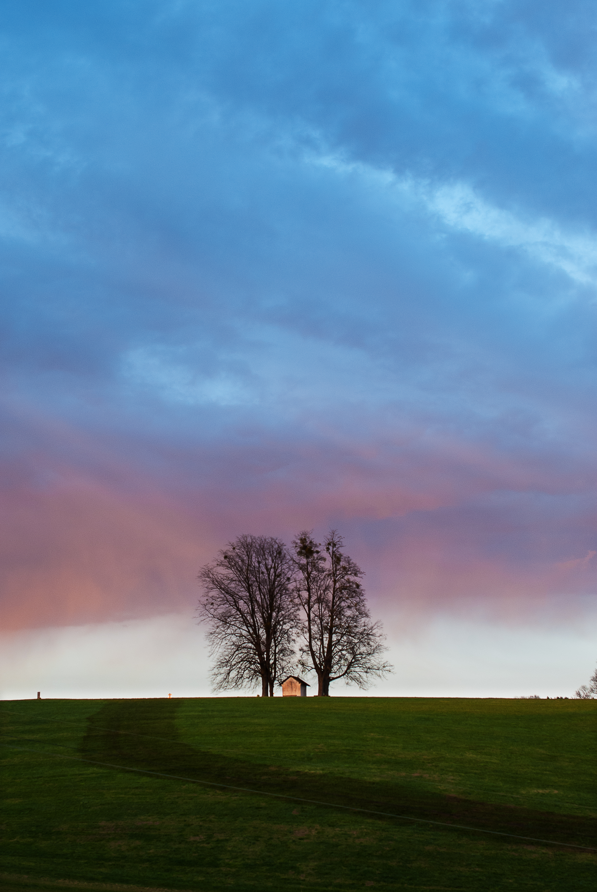 4 Linden bei der Maria Hilf Kapelle This media shows the natural monument in Upper Austria with the ID nd354.